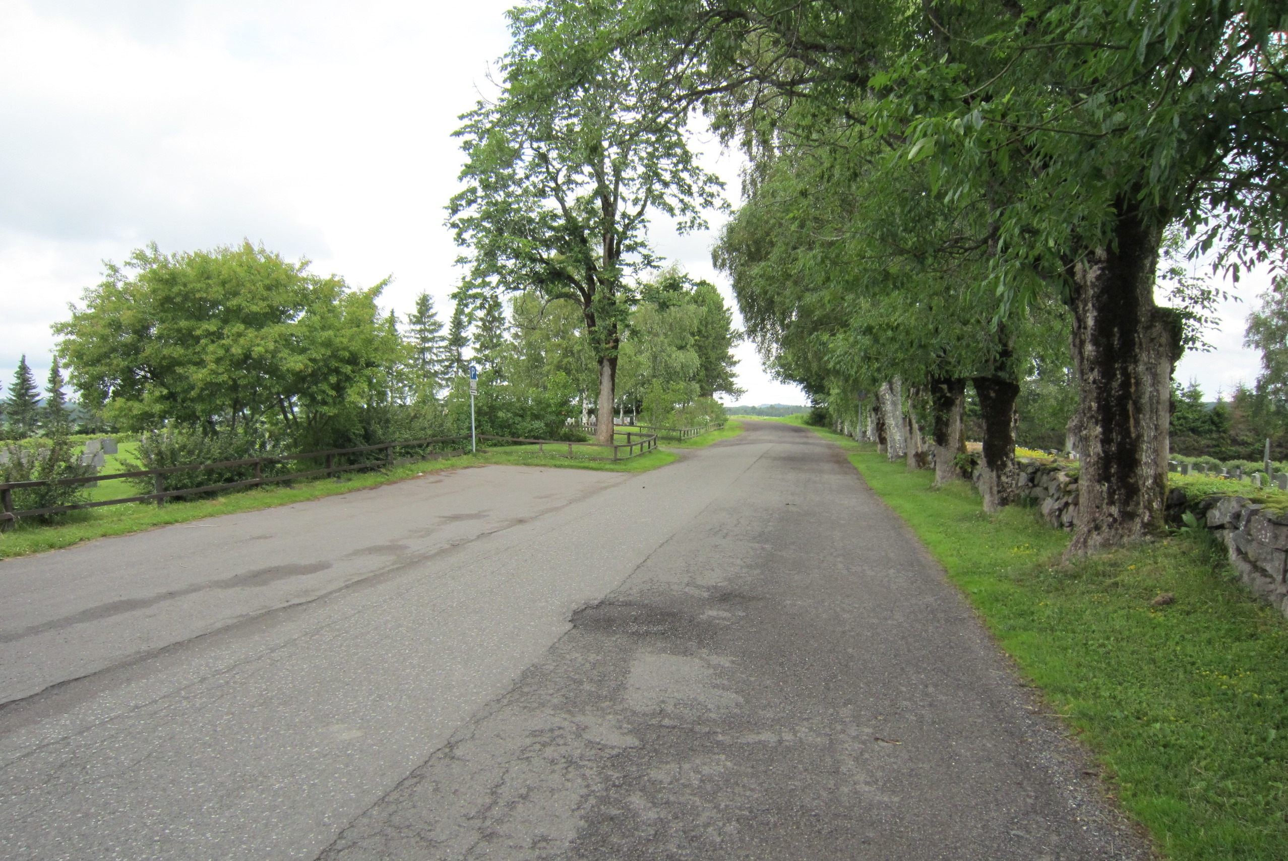 Jarlsberggata (fylkesvei 35) like ved Sem kirke